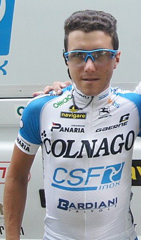 Domenico Pozzovivo during Tour de Pologne 2012